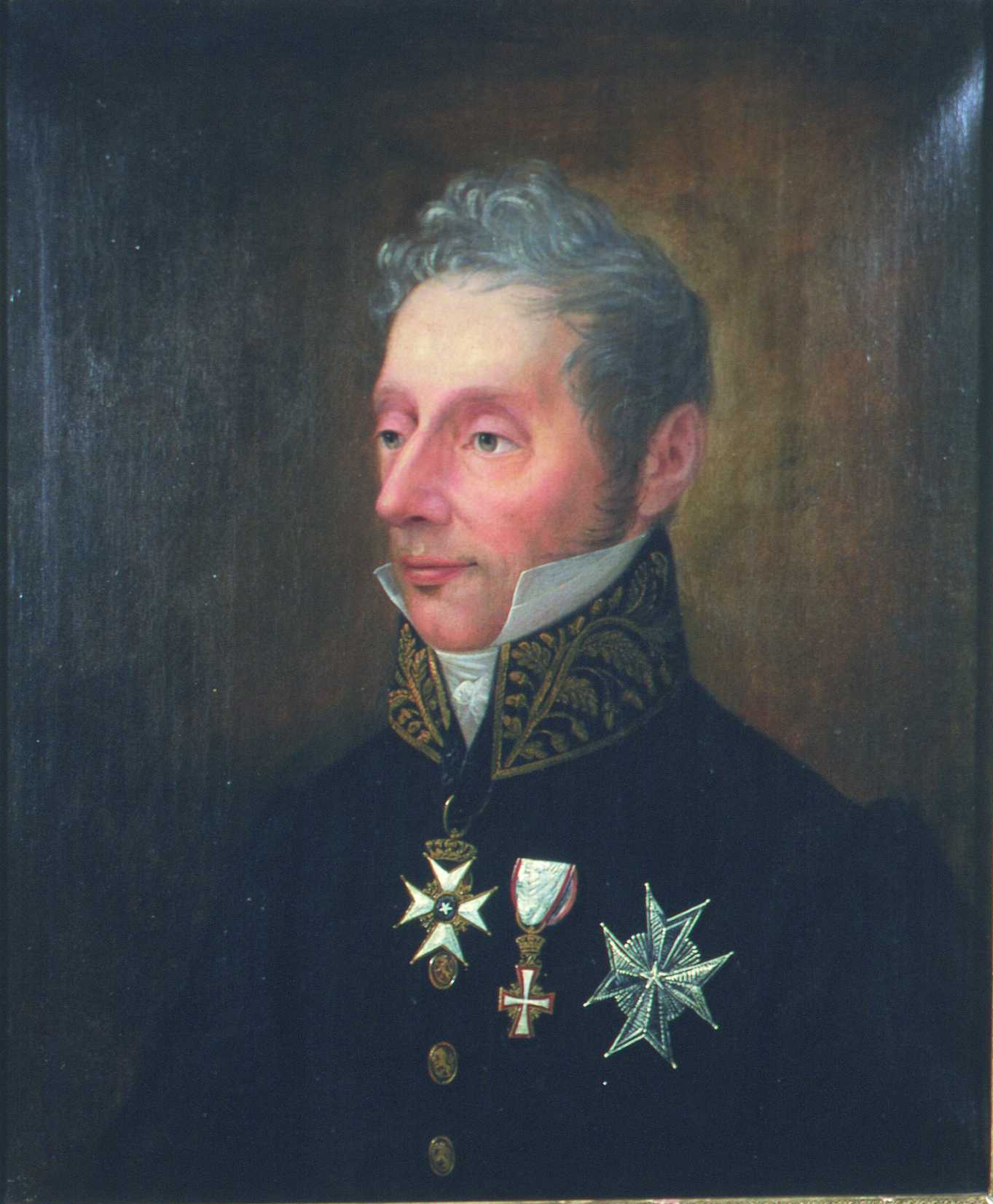 Portrett av H H Falbe. Falbe deltok på notabelmøtet 16.feb 1814. Kort grått hår, mørk uniform m/brodert krave. Tre ordner på brystet. Embetsmannsuniform, antagelig amtmannsuniform, etter 1815. Aksesjon: Gave fra fogd Kierulf v/frk Sofie Kierulf